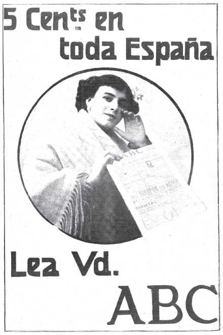 pubblicità del giornale ABC pubblicata il 14.4.1909 su Actualidad di Madrid - "Lea usted ABC"